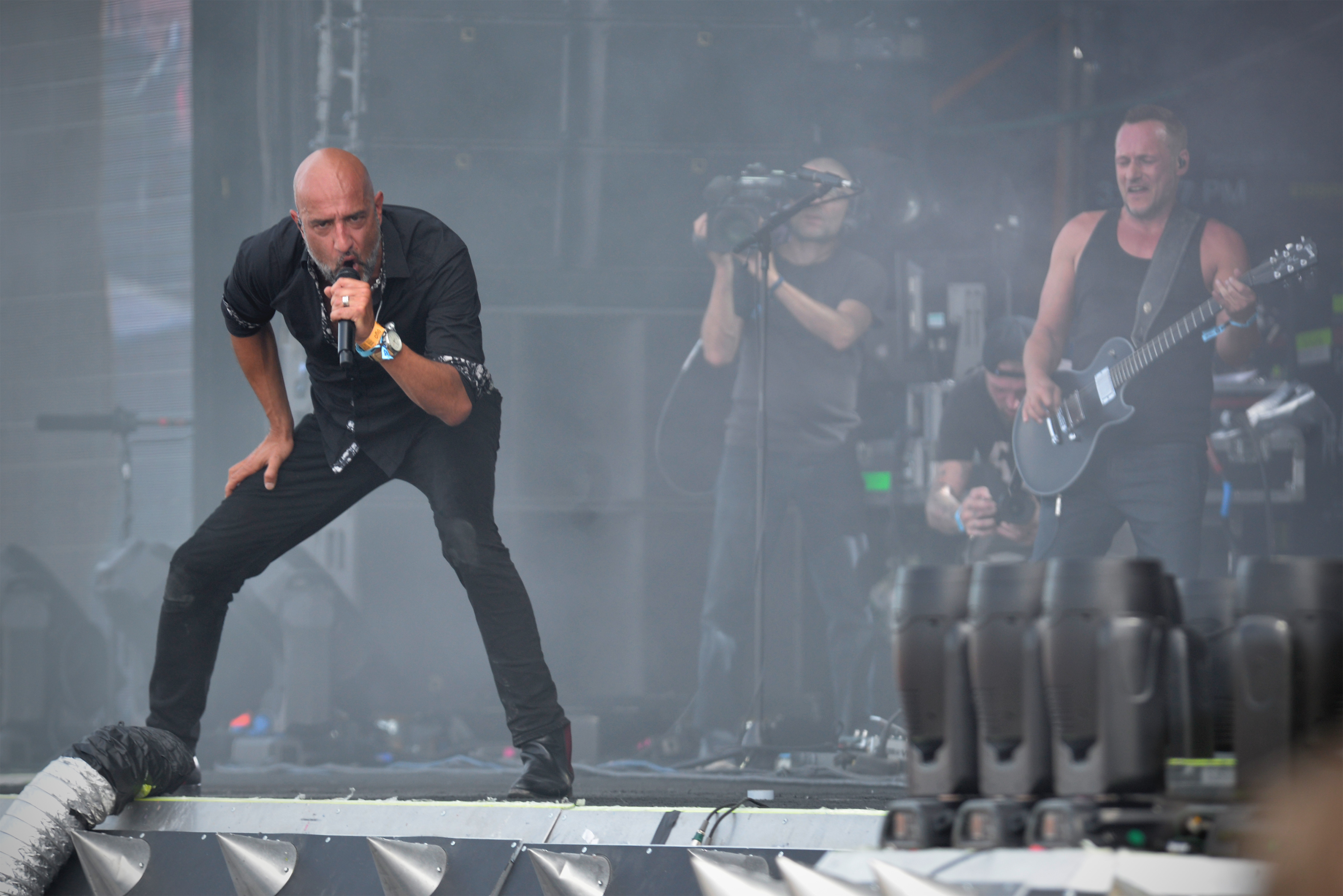 Concert du groupe allemand Eisbrecher au Hellfest 2019, Clisson, France.